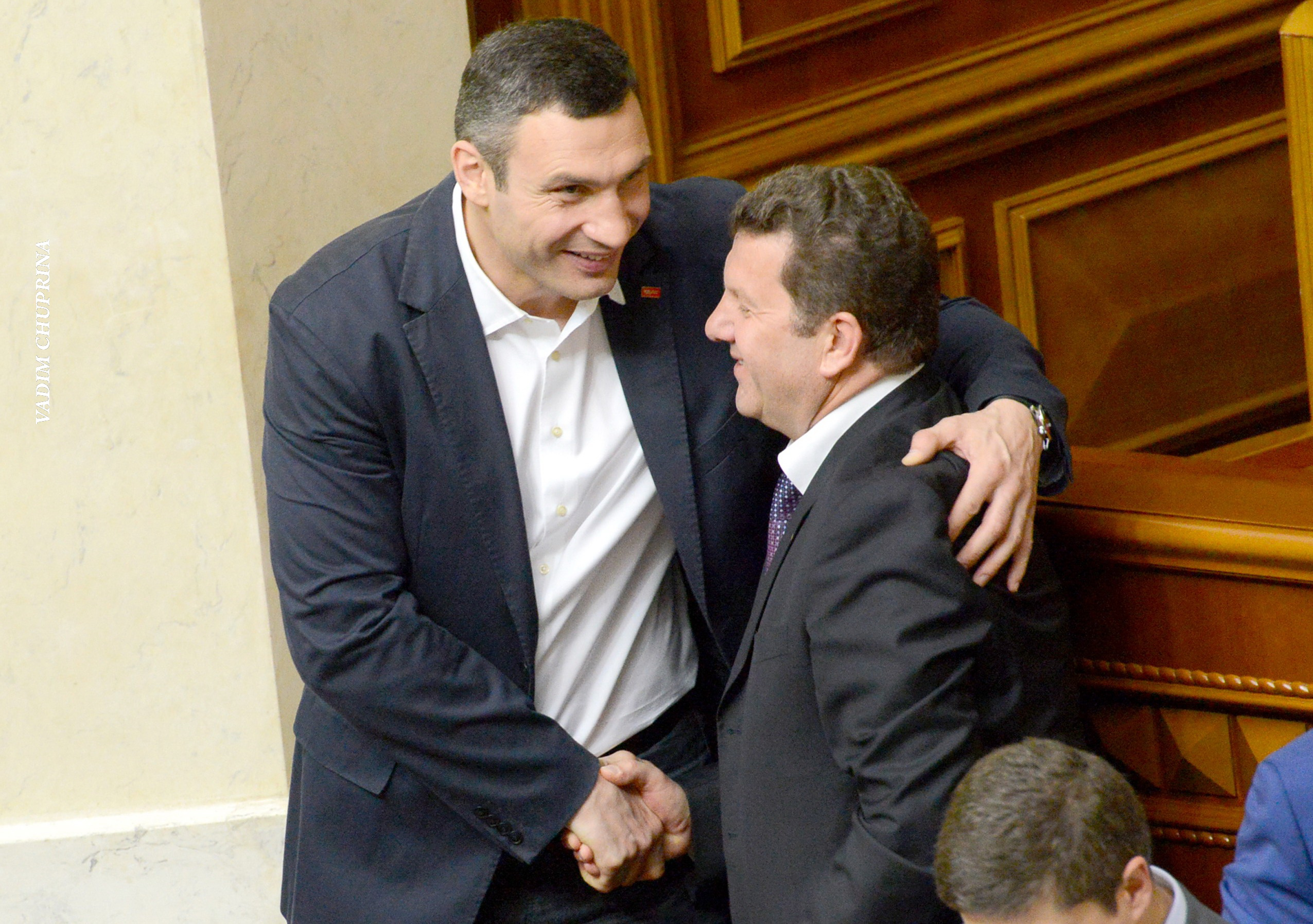 Куніцин Сергій та Кличко Віталій. ВЕРХОВНА РАДА УКРАЇНИ, 2013, фото Чуприна Вадим. А